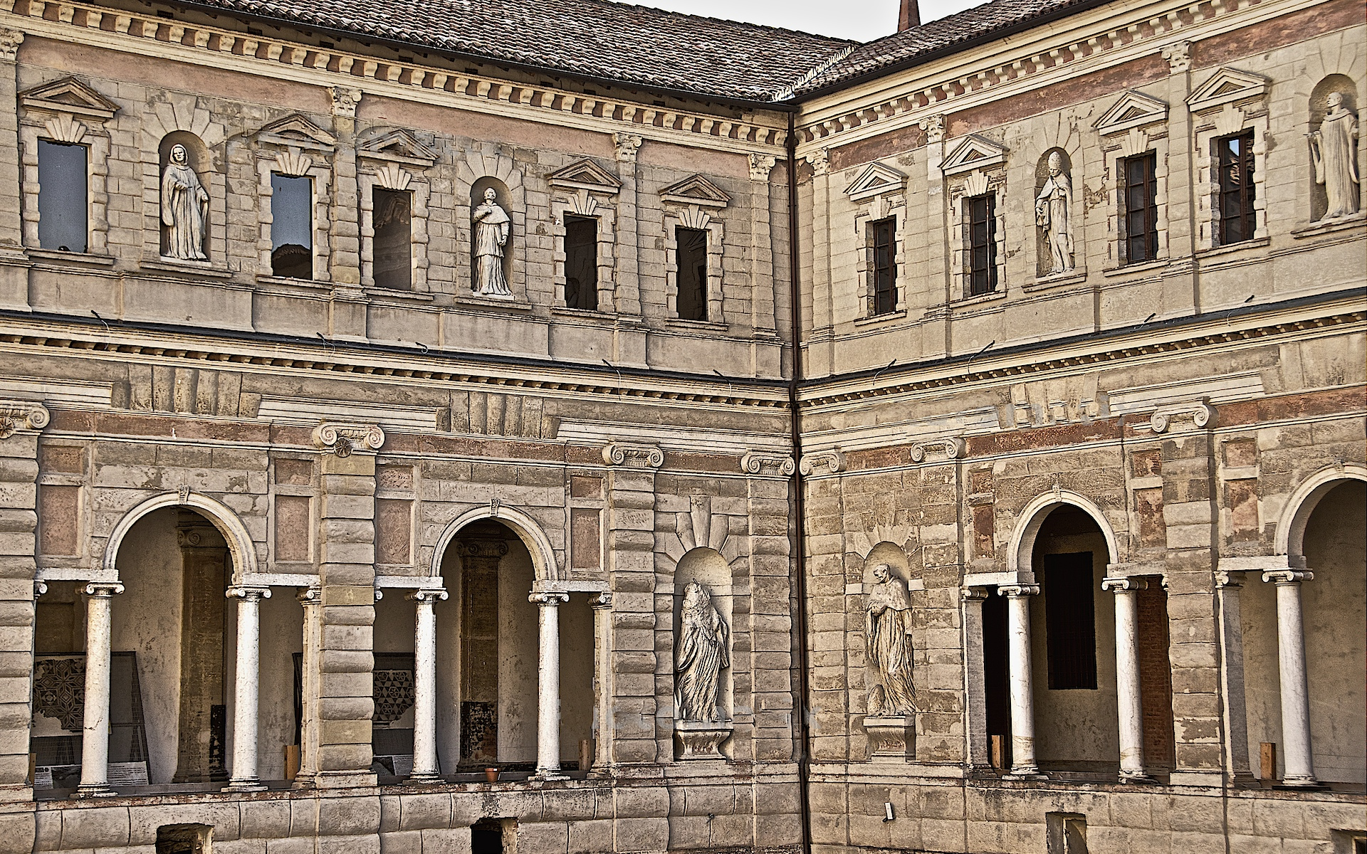 Chiostri di San Pietro This is a photo of a monument which is part of cultural heritage of Italy.